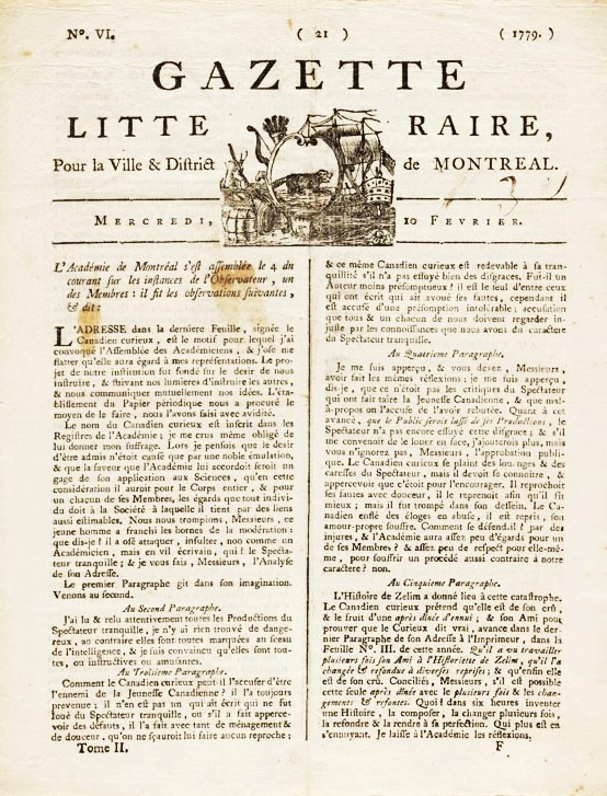 La une de la Gazette littéraire de Montréal Publication littéraire de Montréal intitulée Gazette littéraire pour la ville & district de Montréal, 10 février 1779 Source: Gazette littéraire pour la ville & district de Montréal Montréal : Chez F. Mesplet, 1778-1779. -- No. VI (Mercredi, 10 février 1779). -- v. ; 26 cm. -- ISSN 0826-0575. -- P. 21